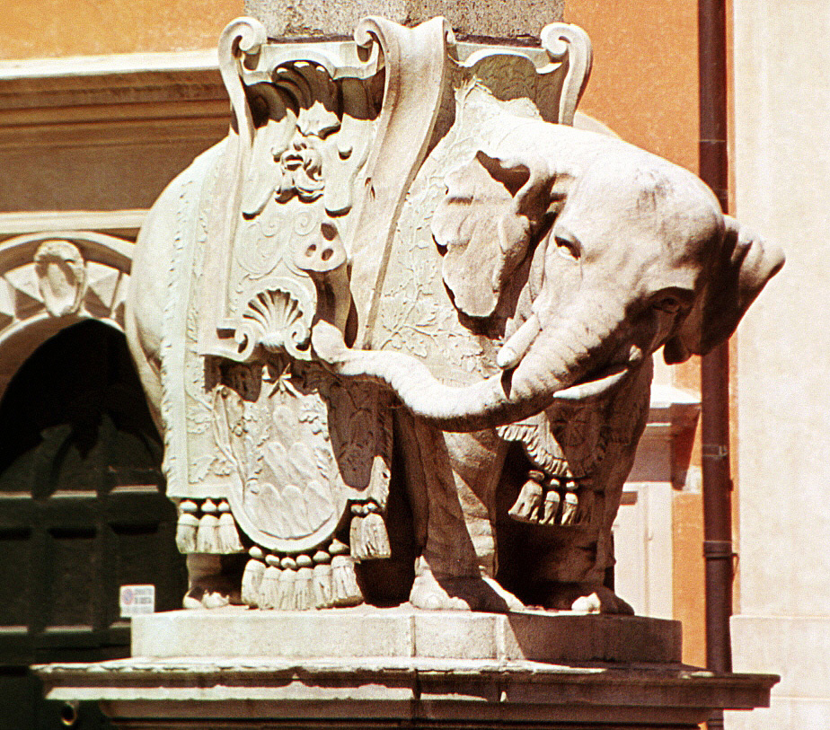 Elephant par Le Bernin. Il est surmonté par un obélisque. Situé Piazza Minerva.